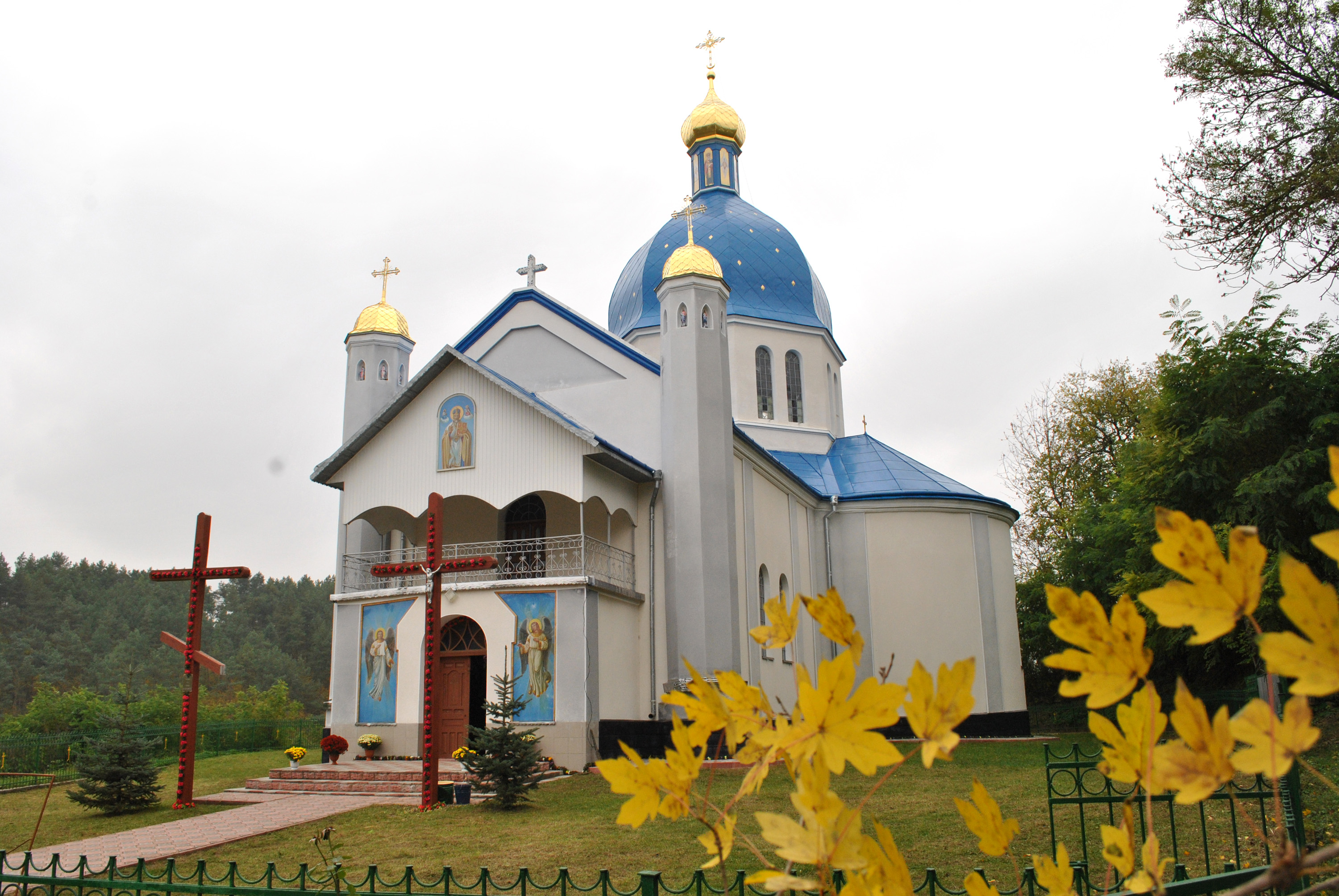 Пам'ятка архітектури місцевого значення: церква Святого Миколая (мурована) в Тудорові Гусятинського району Тернопільської області.